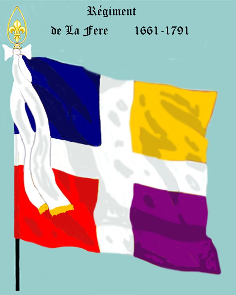 Ordonnanzfahne eines königlich französischen Infanterie-Regiments. - Entnommen und überarbeitet aus: „LES UNIFORMES ET LES DRAPEAUX DE L'ARMÉE DU ROI“ Marseille 1899. (Drapeau d'ordonnance d' un régiment d'infanterie royale française.)